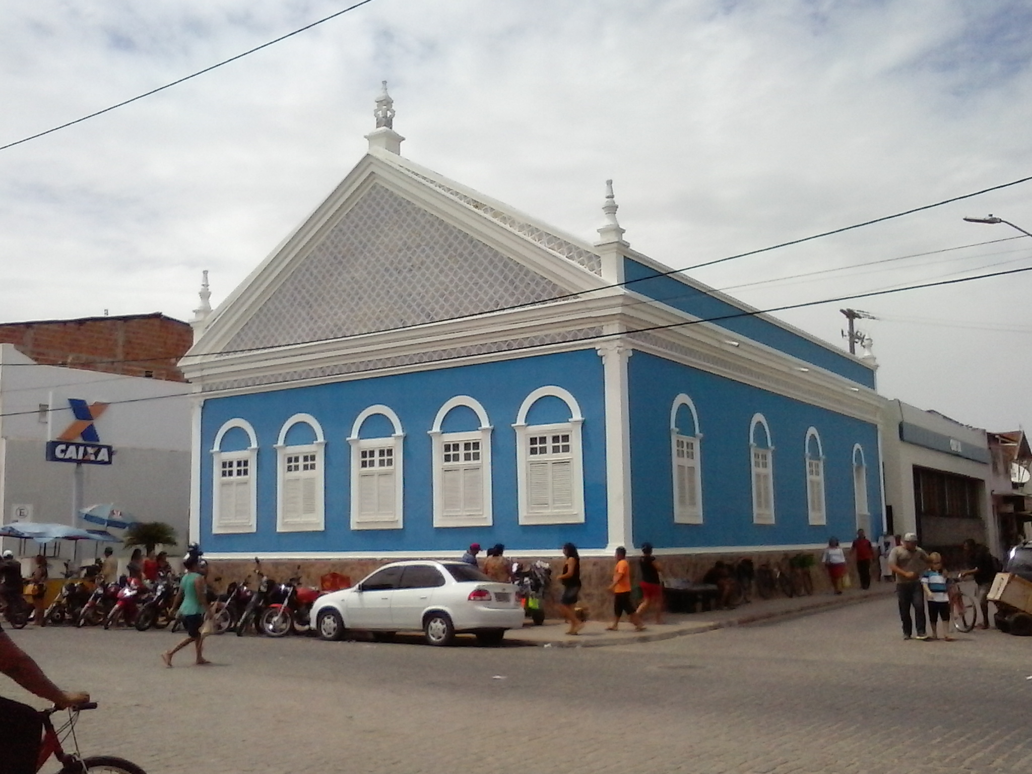 Caixa Econômica Federal de Aracati, Ceará, Brasil.